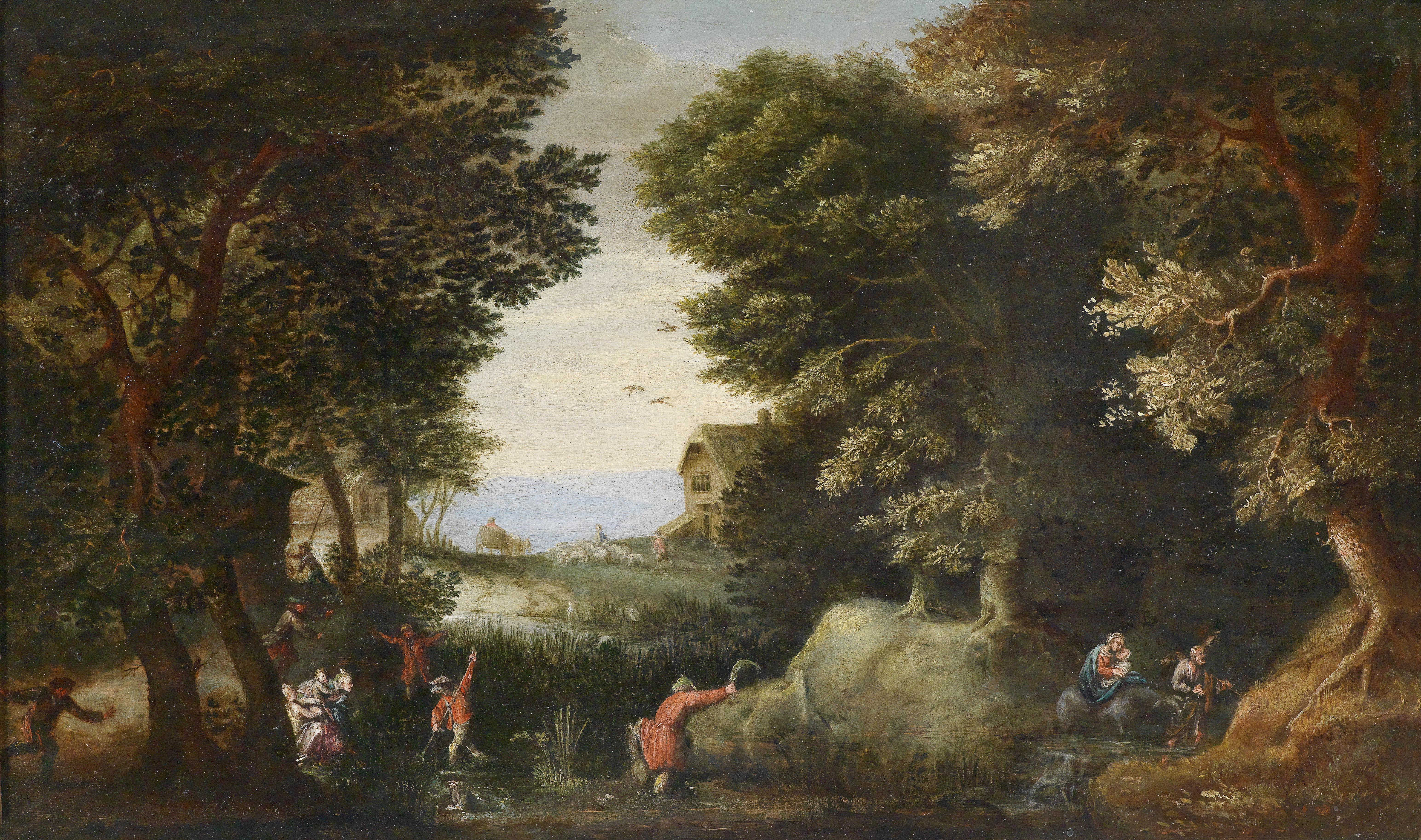 Die römische Göttin ‚Latona‘ wurde in späterer Zeit der griechischen ‚Leto‘ gleichgestellt. Sie verwandelte die lykischen Bauern in Frösche, weil diese ihr verboten aus einem See zu trinken bzw. sie wurden auf ihre Bitte hin von Zeus in Frösche verwandelt.